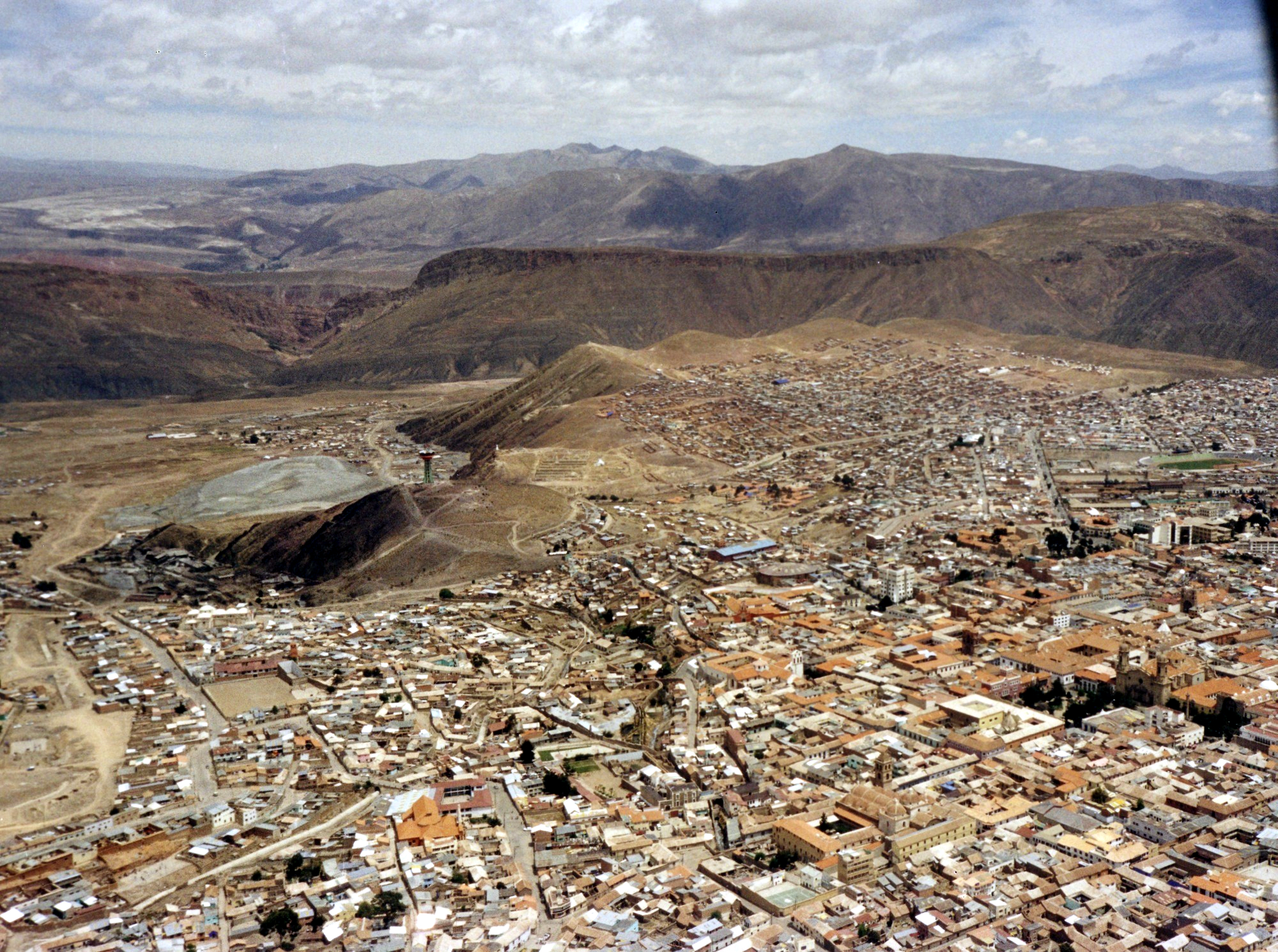 Potosi as seen from paraglider